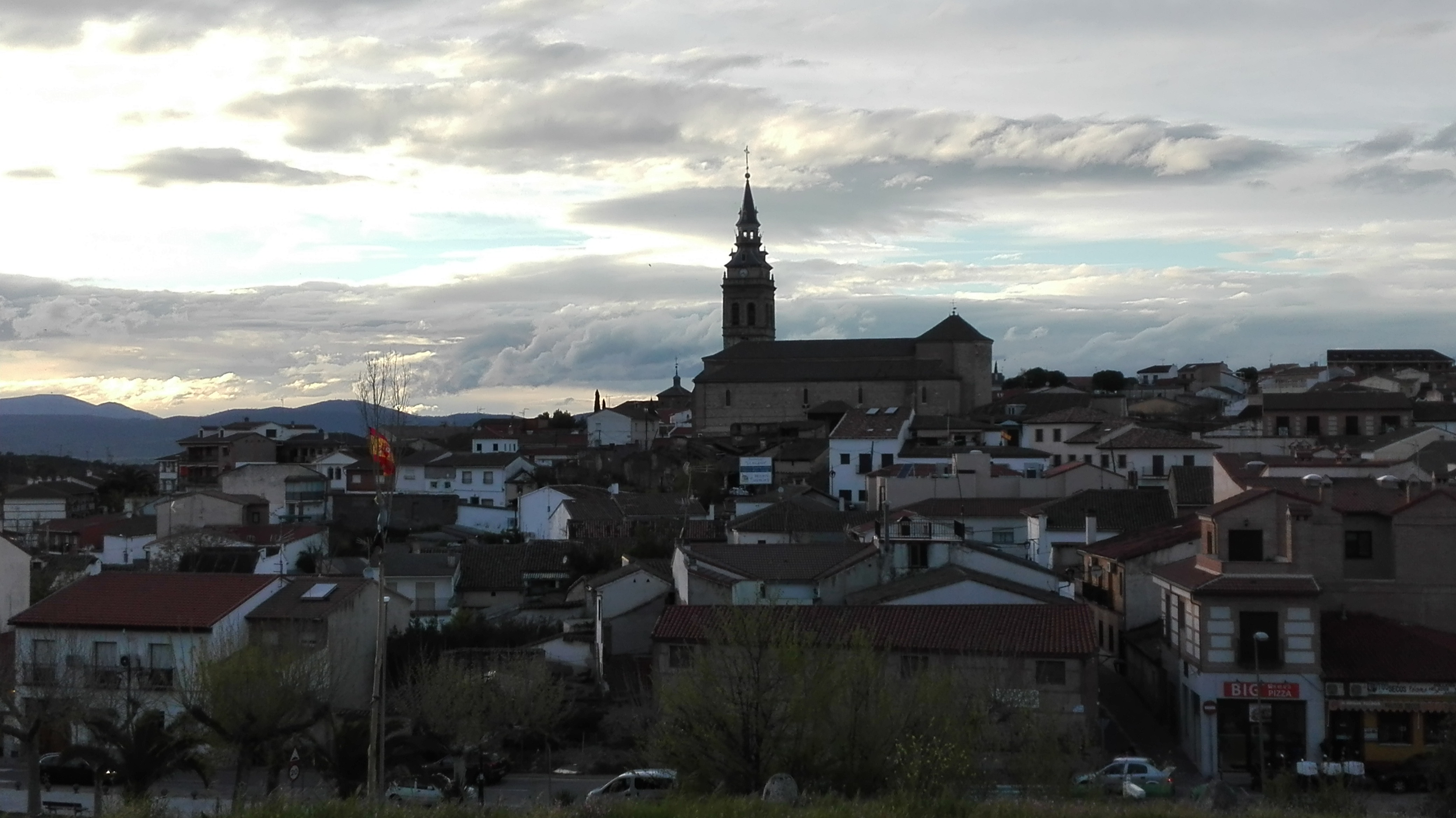 Imagen del pueblo